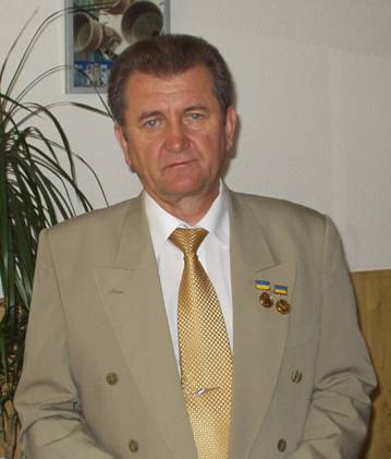 Пройдак Юрій Сергійович — академік АН вищої школи України